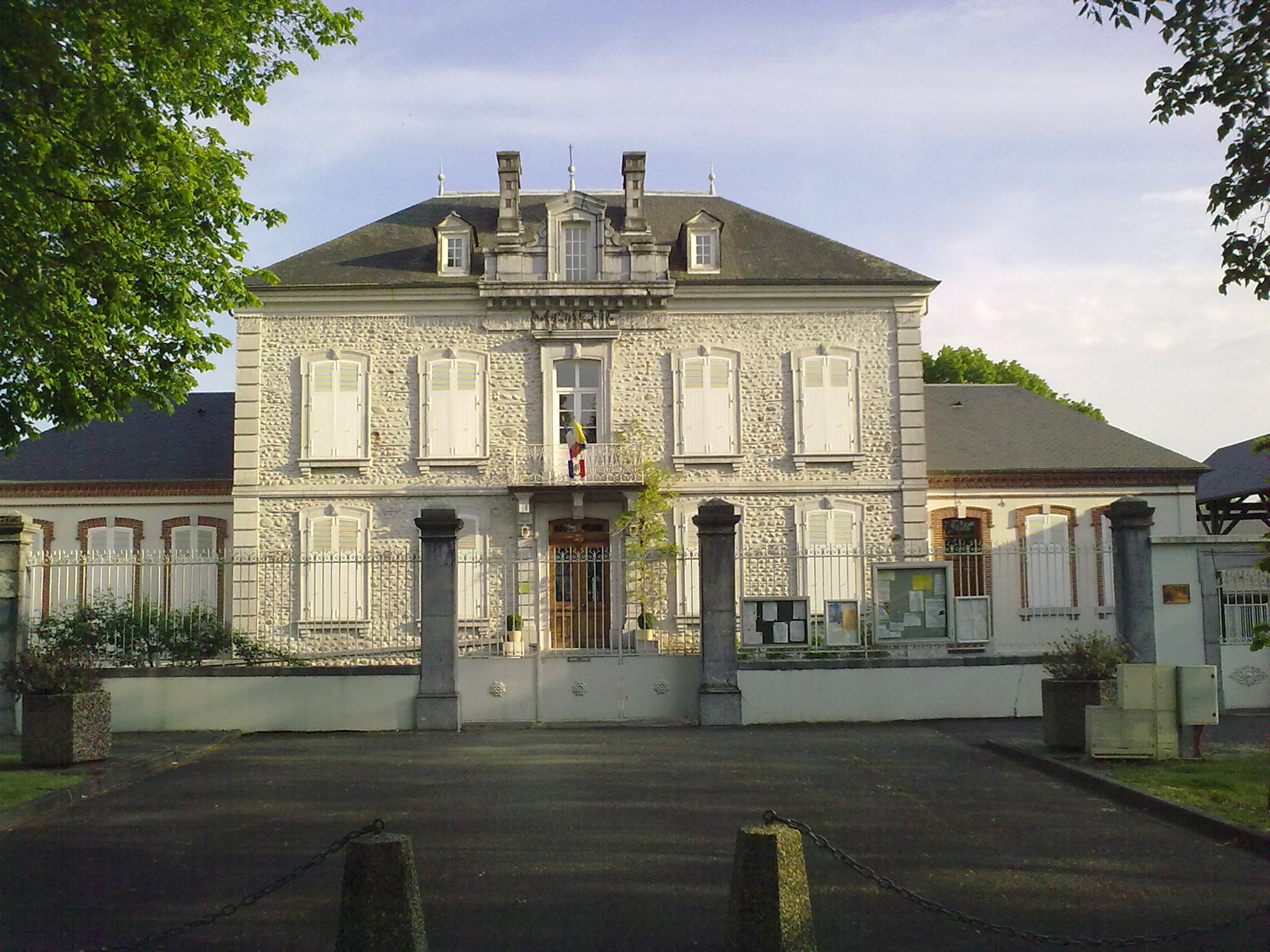 Laloubère, France, Mairie en pierre et galets